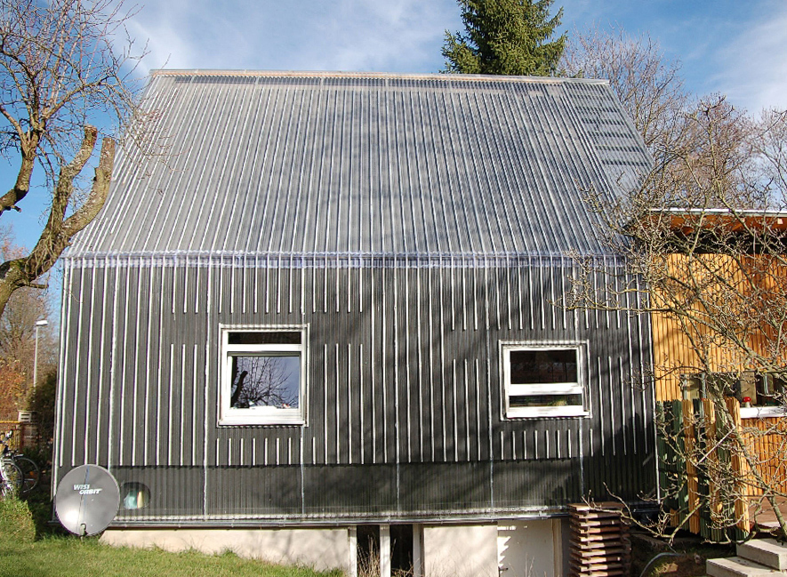 das Dach als Luftkollektor der Kinder-Reitschule "Hoppla Hopp" in Stuttgart. Hier wird die Luft über einen mit offenporigen Tonziegelböden, sowie per Wärmetauscher für Warmwasser abgeleitet.